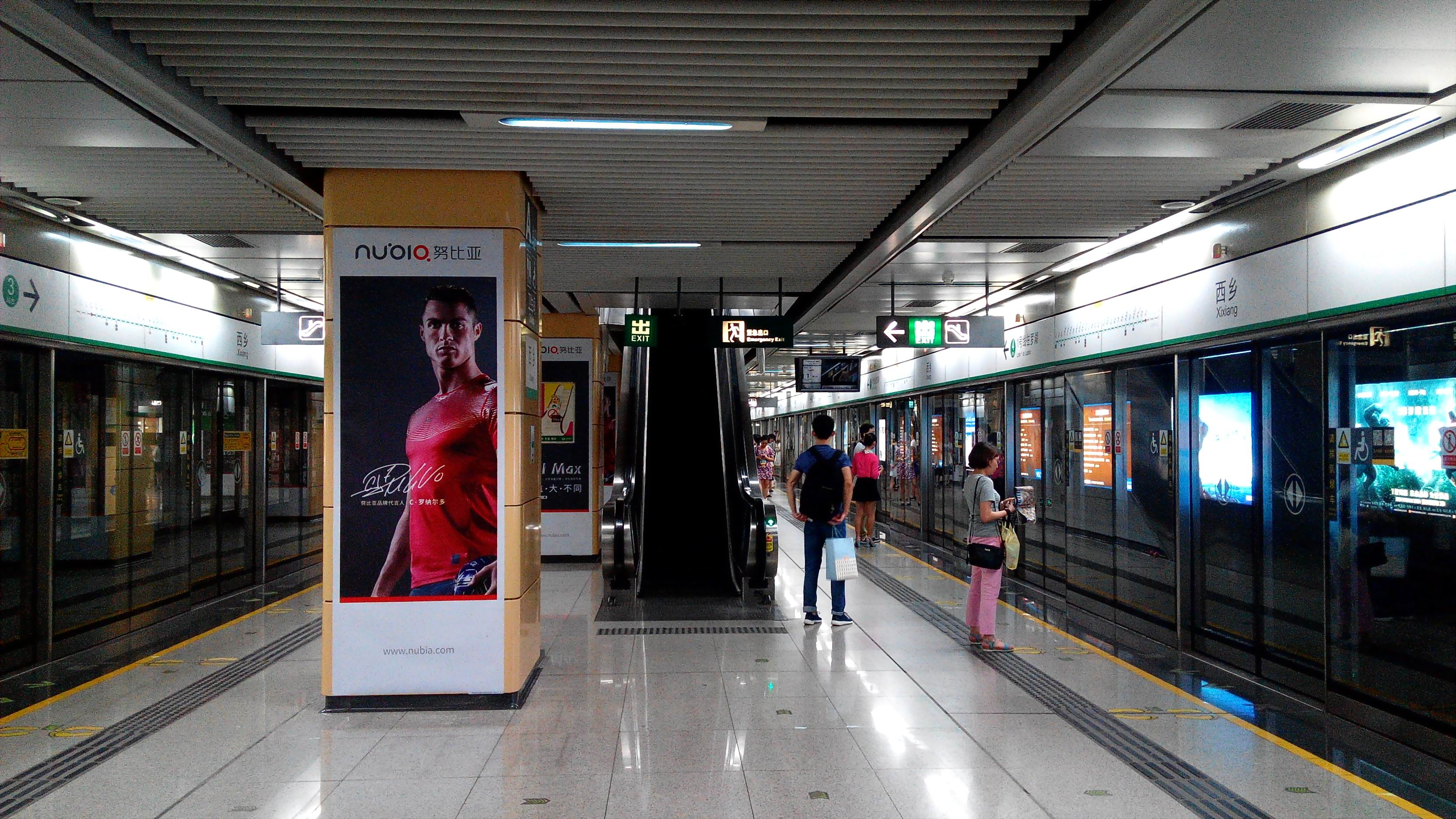 深圳地铁1号线 西乡站 3、4号站台